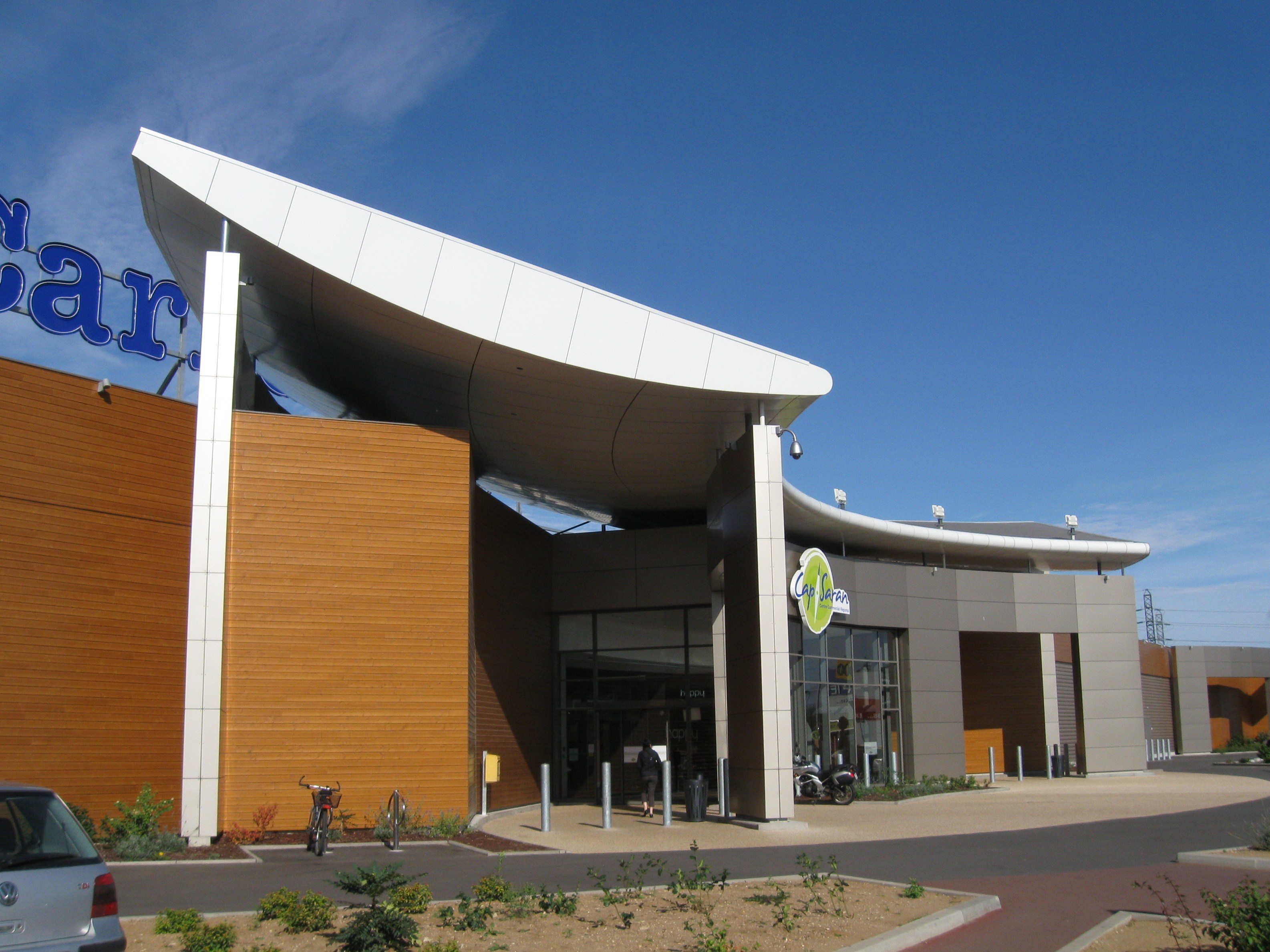 Le centre commercial Cap Saran, Saran, Loiret, France